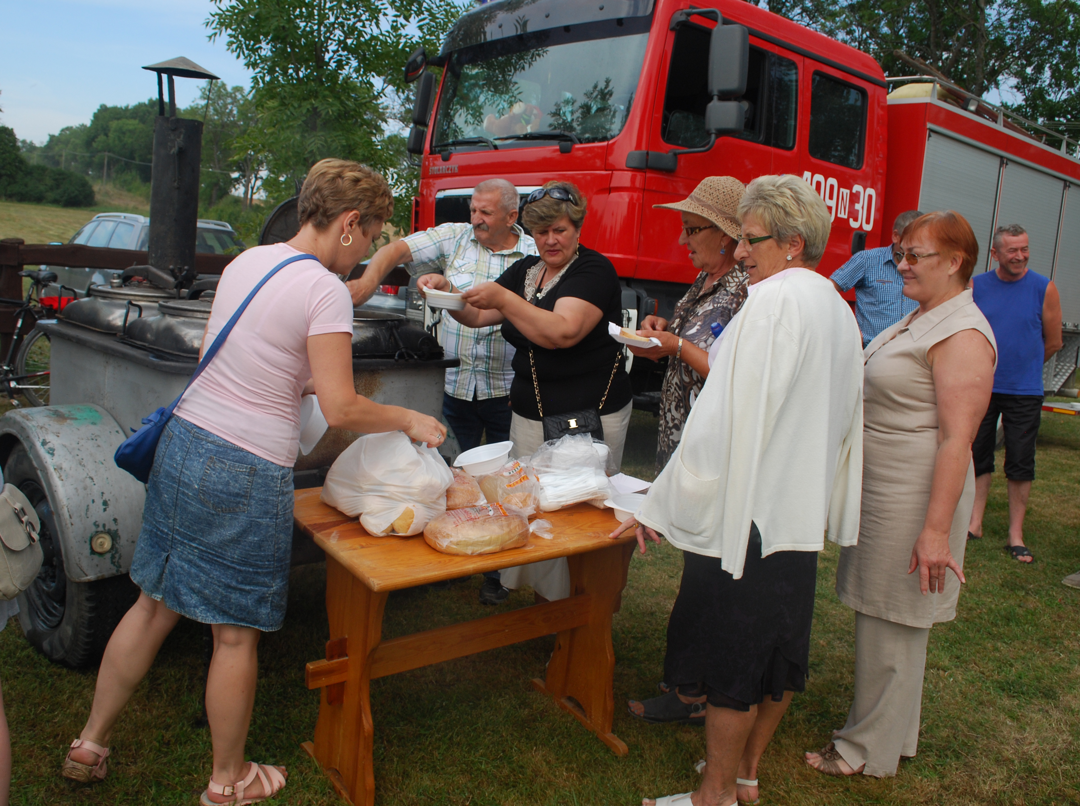 Rok Obrzędowy z Wikipedią - Nowa Wieś Reszelska - Grochówka - dar OSP